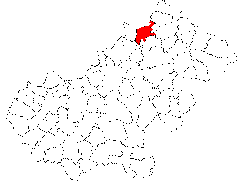 Categorie:Hărţi ale judeţului Satu Mare